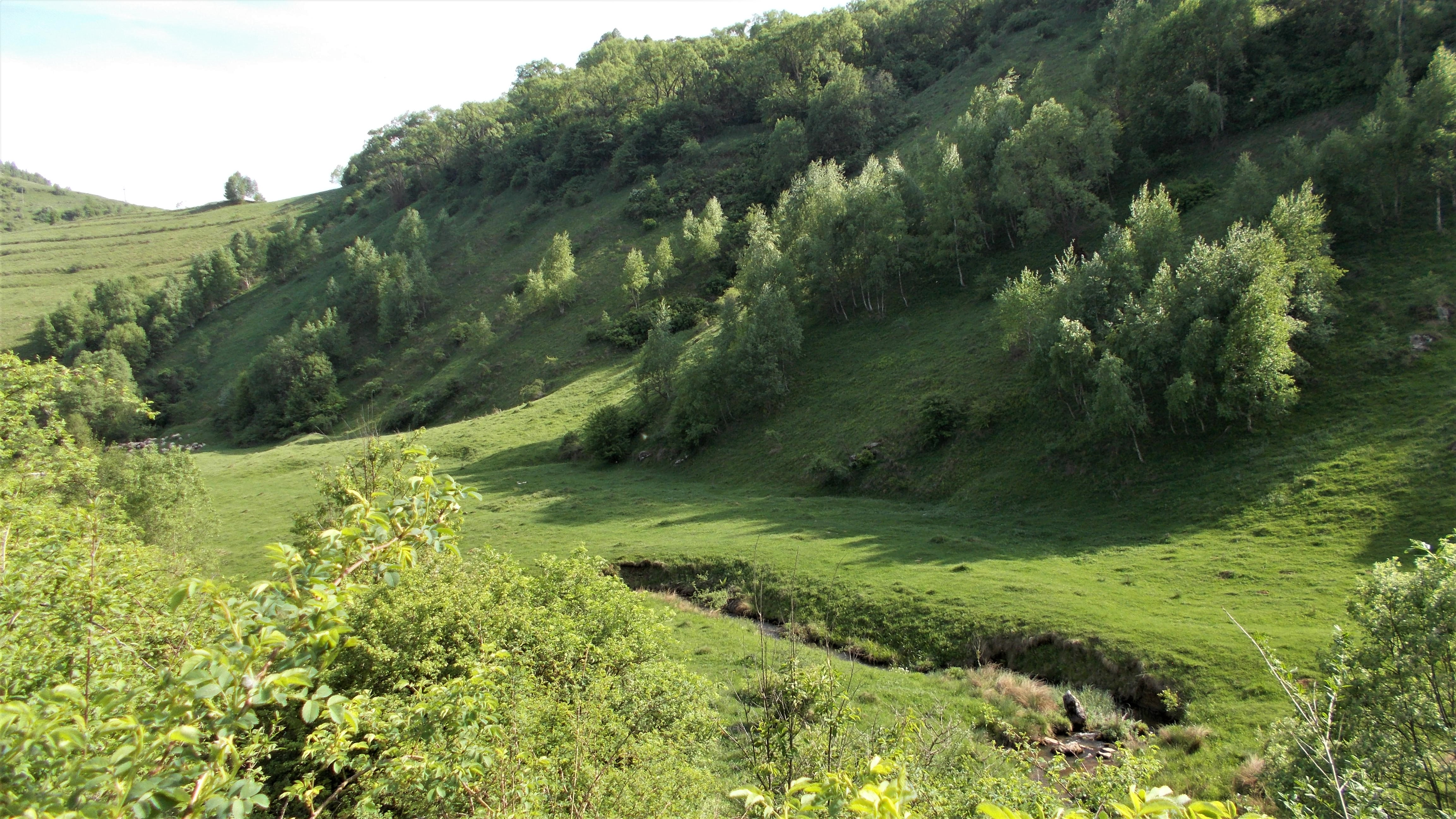 Ținutul Pădurenilor - sit (Natura 2000) de importanță comunitară. Comuna Bunila, județul Hunedoara.